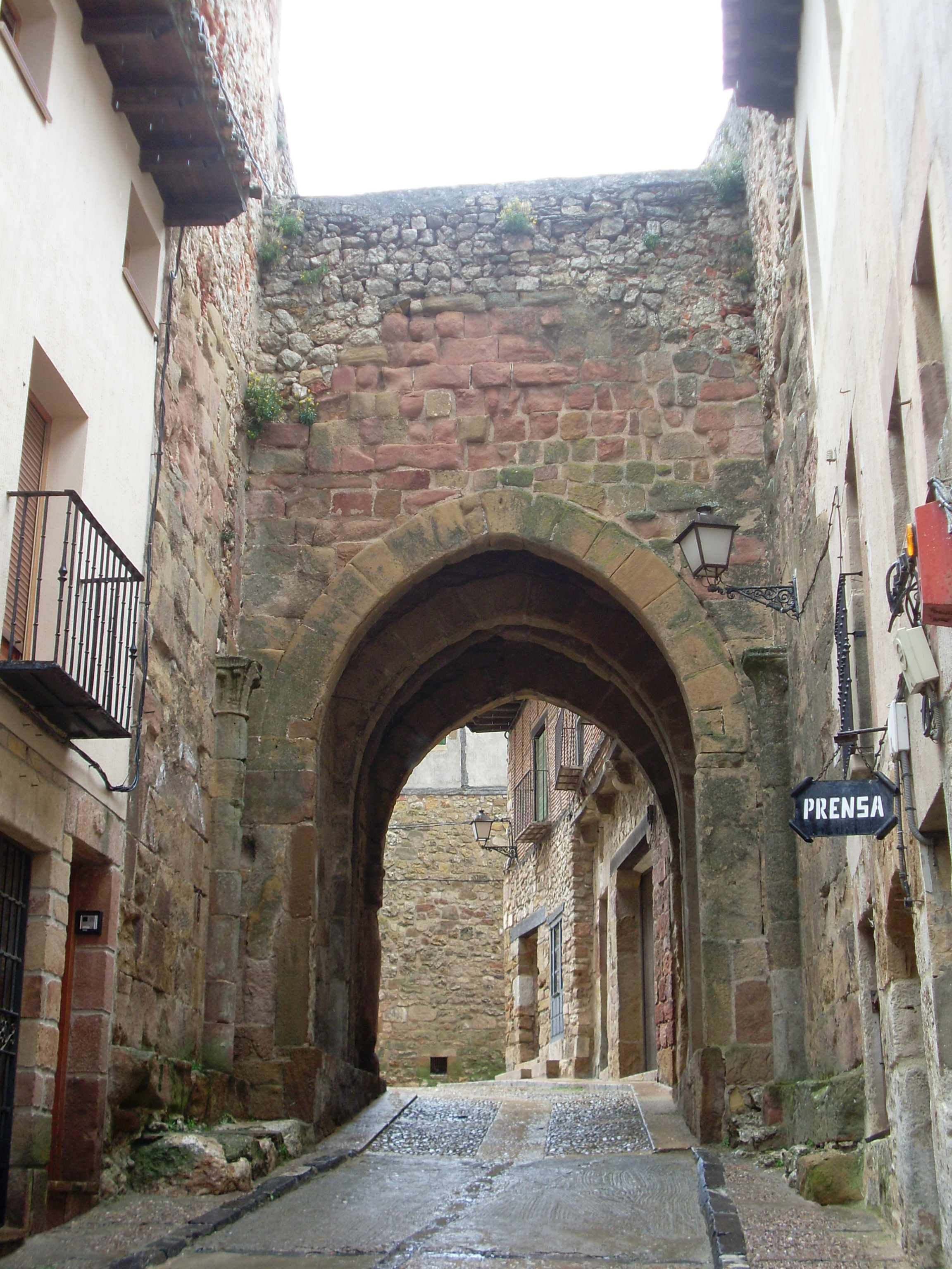 Arco de Arrebatacapas en Atienza (Guadalajara, España)